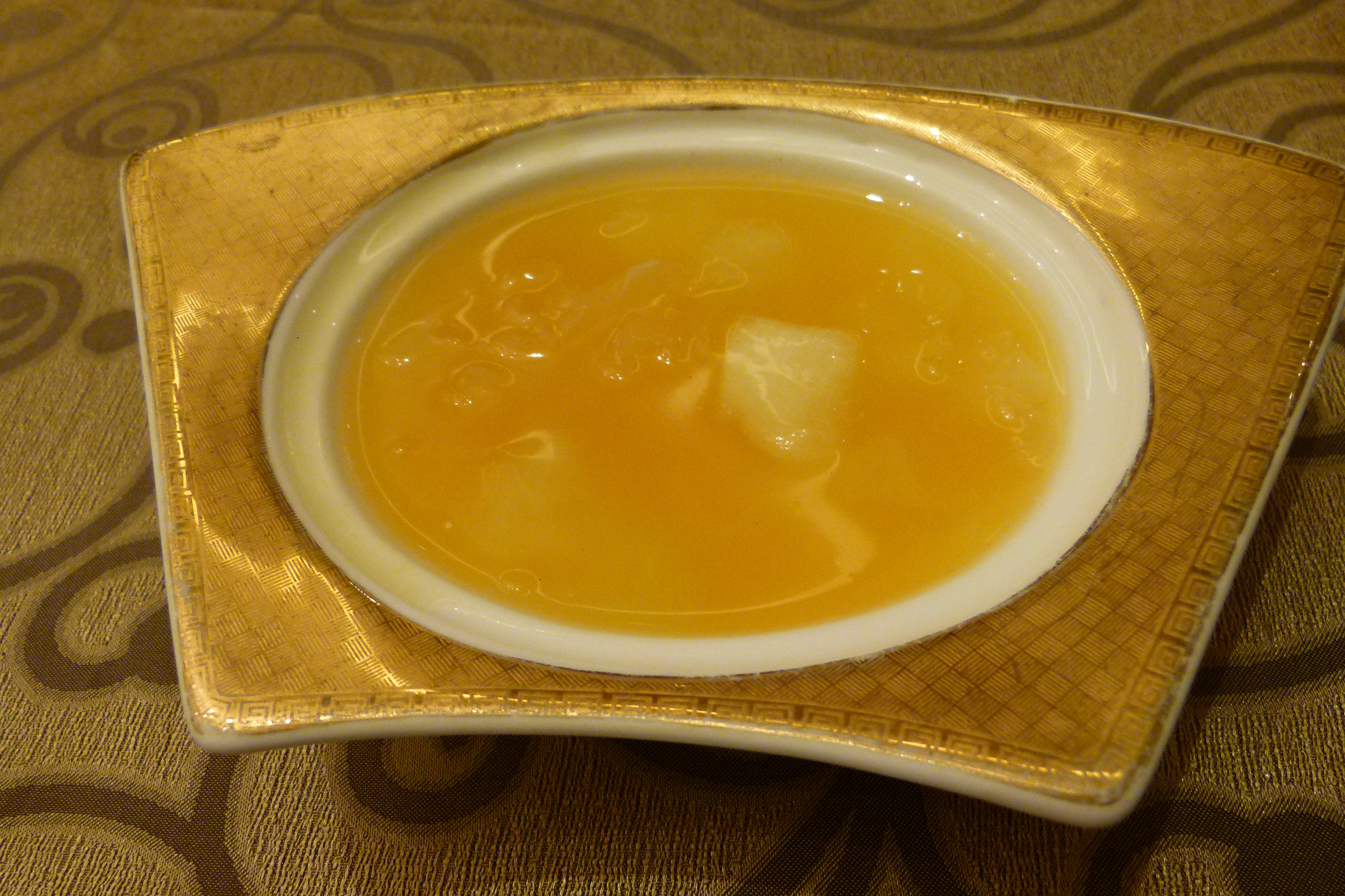 Chinesische Fruchtsuppe, basierend auf verschiedenen chinesischen Kürbissorten, in Lanzhou, Provinz Gansu, Nordwesten Chinas